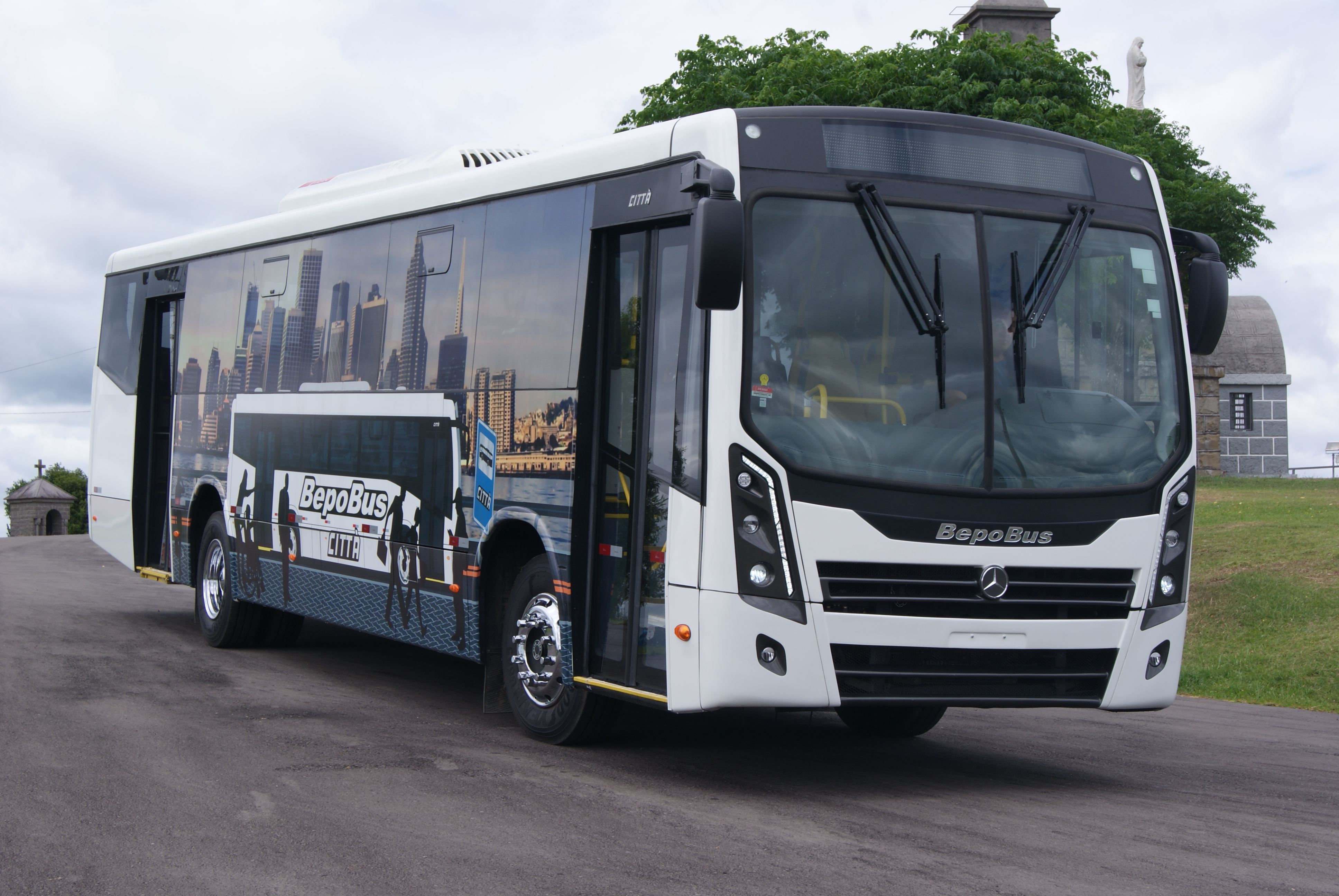 BepoBus Città Urbano, São Marcos, 2019